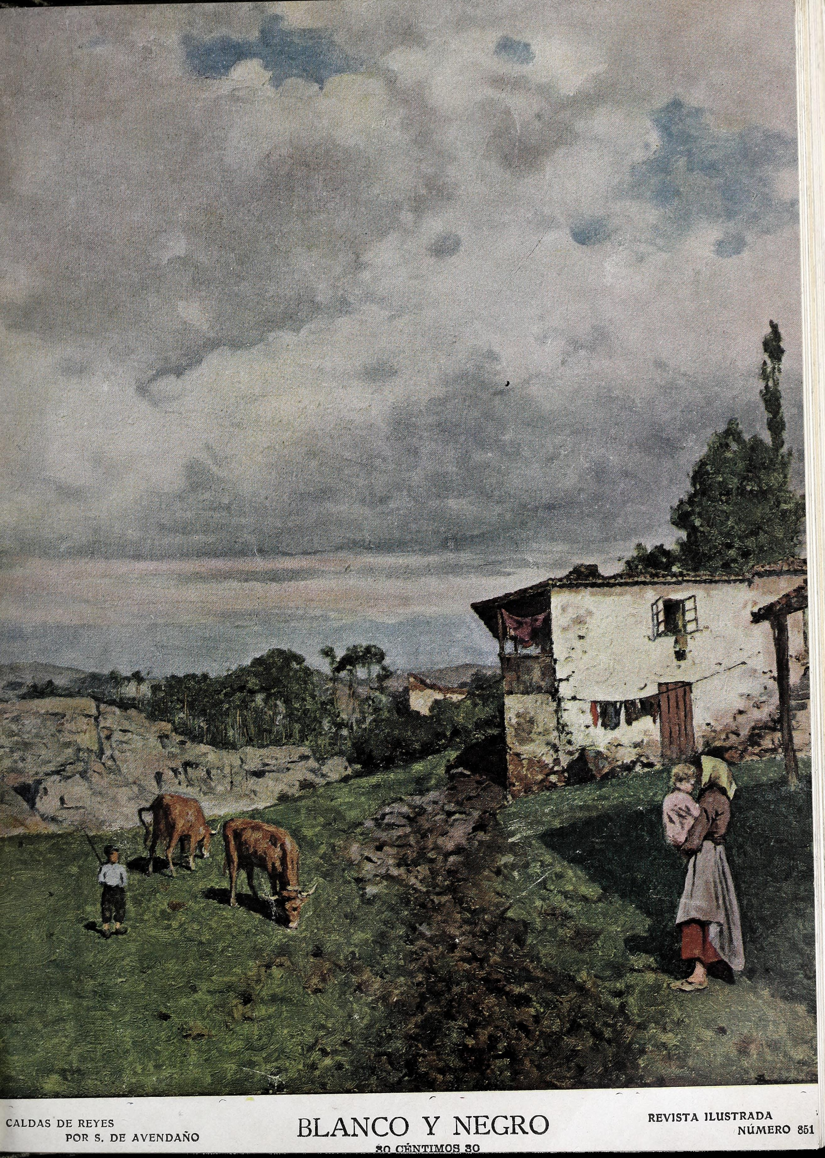 Caldas de Reyes.